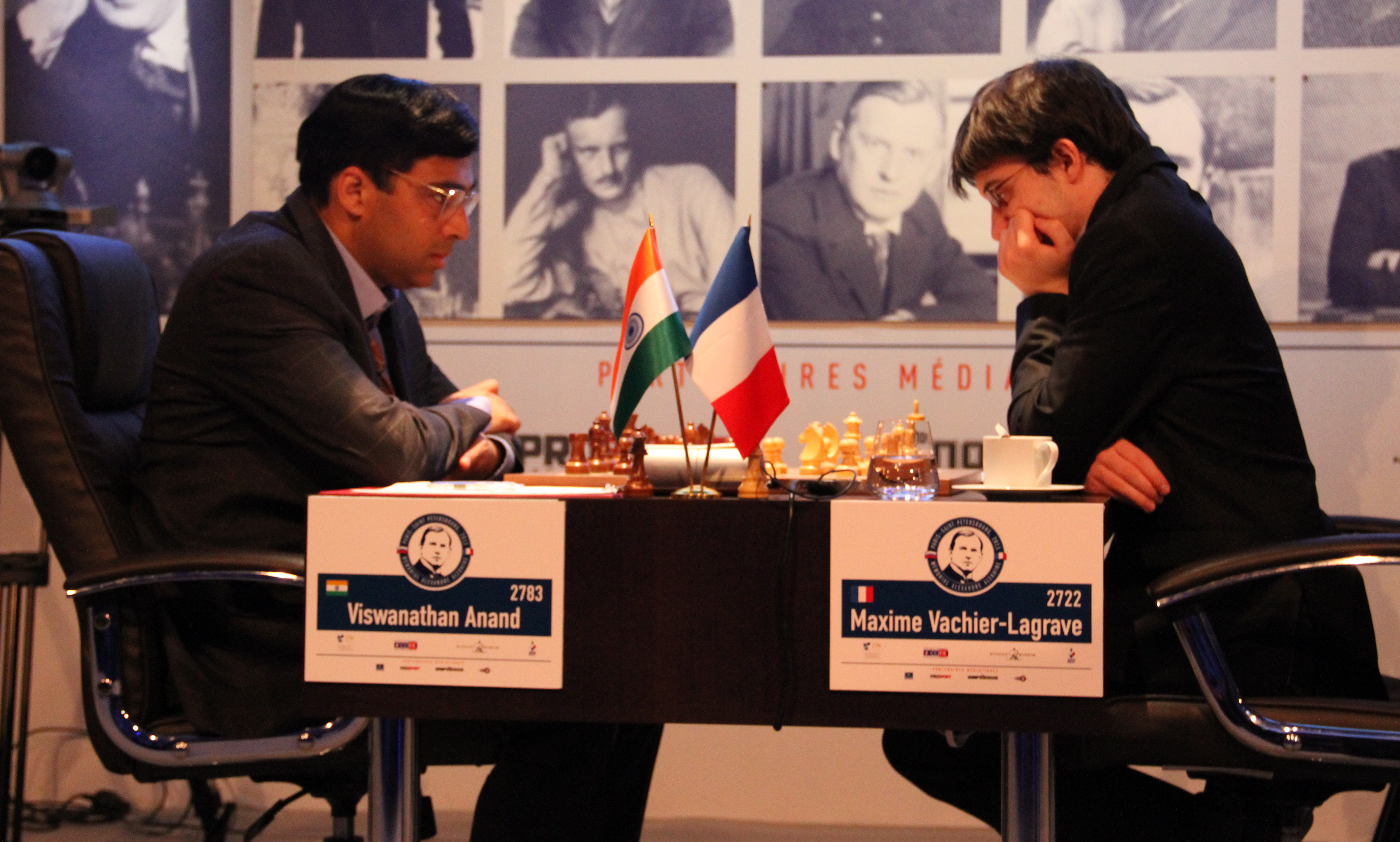 Partie opposant maxime Vachier Lagrave à Vishwanathan Anad au Mémorial Alakhine en Avril 2013 à Paris